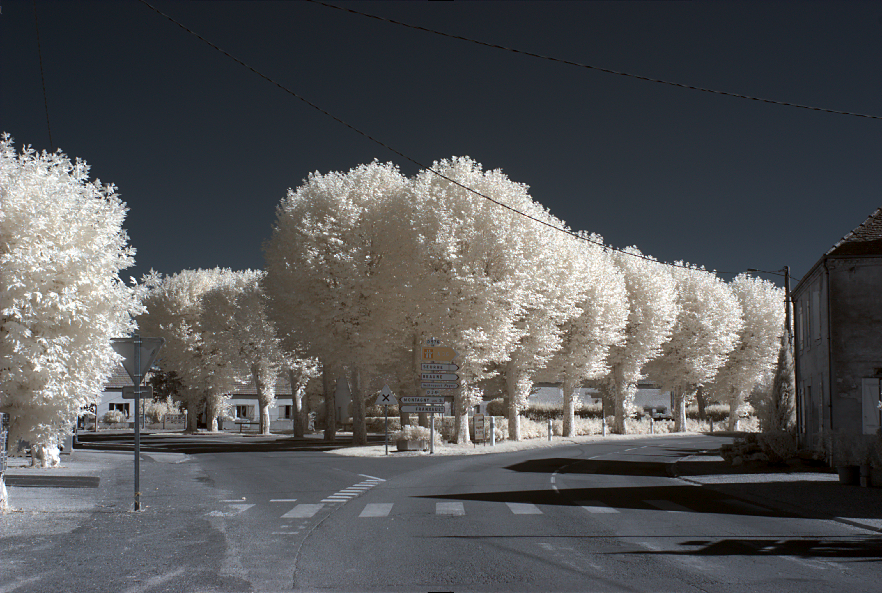 Place des Platanes, Pagny-le-Château (Côte d'Or, Bourgogne, France) photographié avec un filtre infrarouge 720 nm.